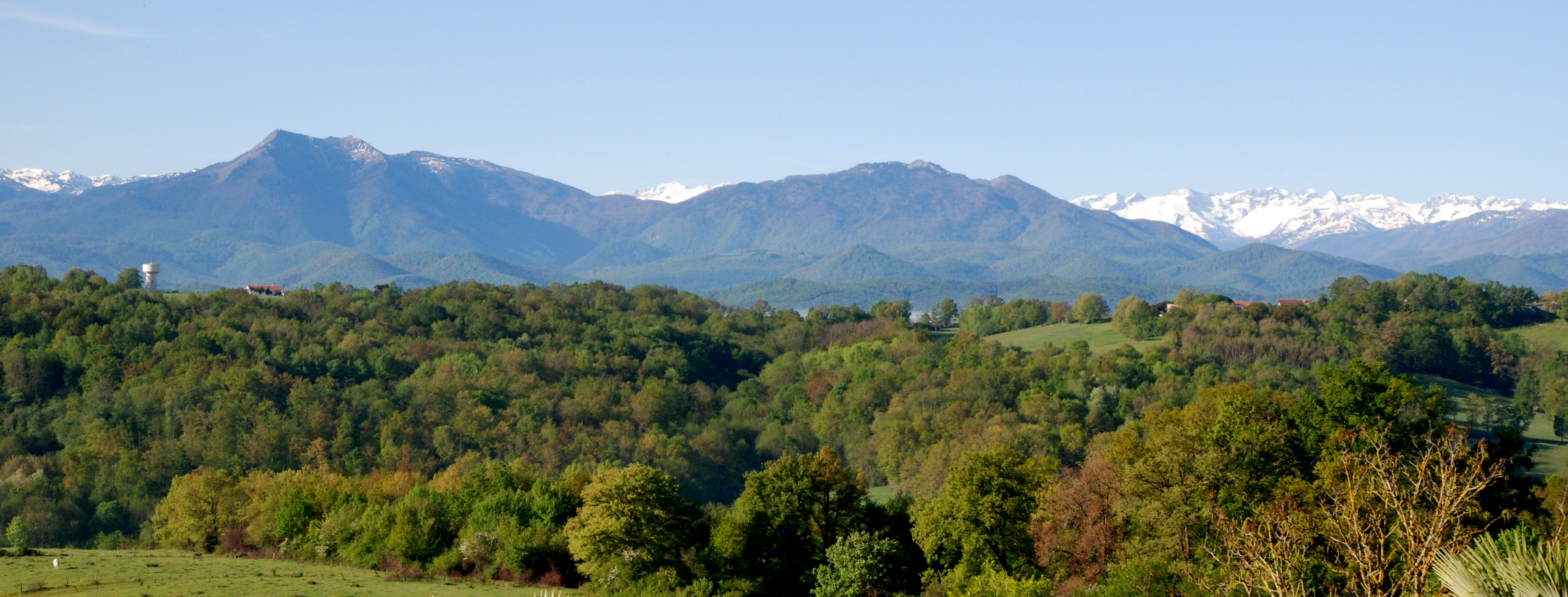 Les Pyrénées vus de Liéoux (Haute-Garonne, France).